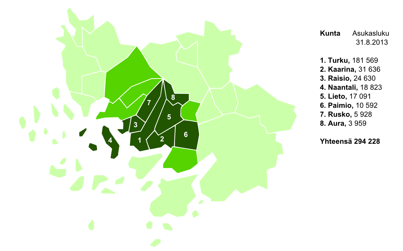 Turun kaupunkiseutu Turun kaupunkiseutu Turun seutukunta Varsinais-Suomi